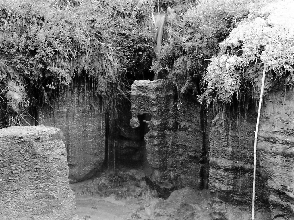 Proceso de la formiĝo de la termoerozia entranĉiĝo post longdaŭra pluvado. La ravino kreskis po pli ol 10 metroj diurne. Suda Gidano. Julio 1988.